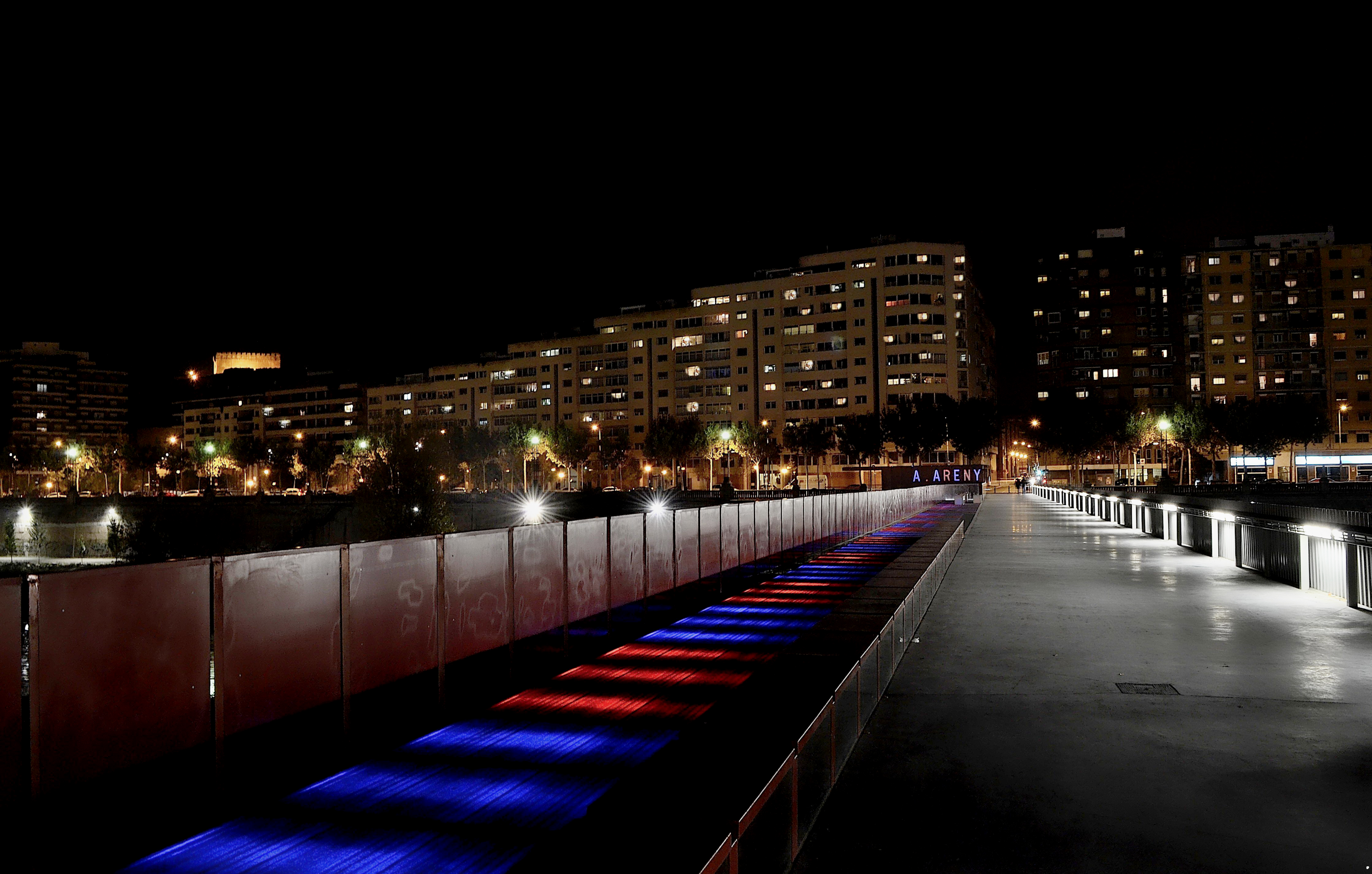 La pasarela de los Maristas cruza el rio Segre para unir el Campus Universitario, en la barriada de Cappont, con la ciudad.